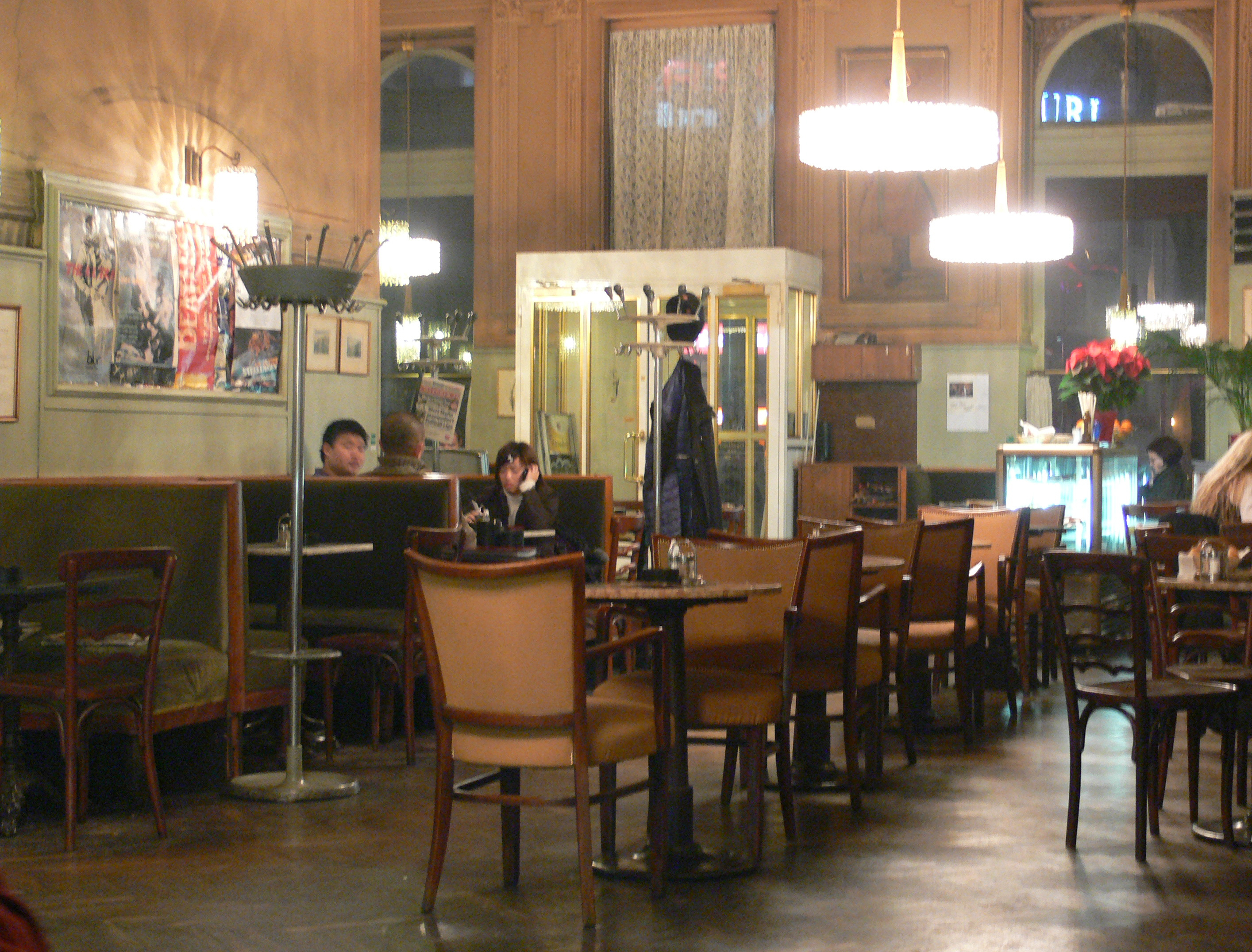 Café Westend, Wien